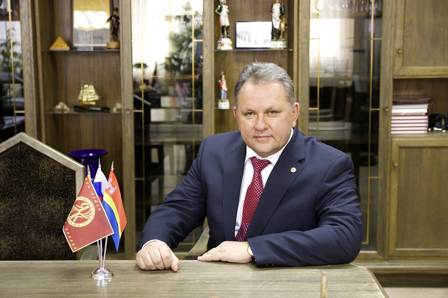 Генеральный директор АО «Калининградский янтарный комбинат» - Михаил Иванович Зацепин